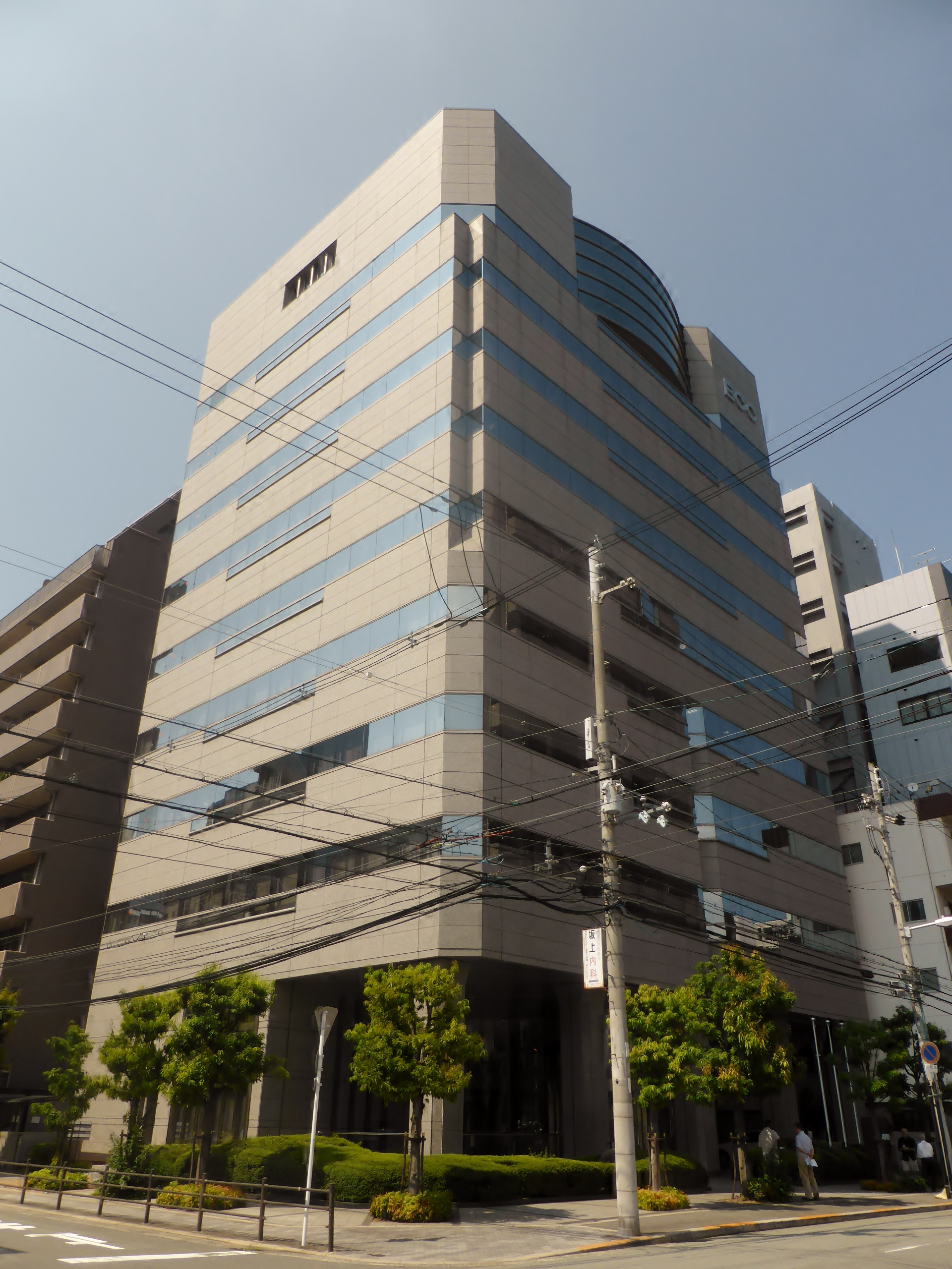 ECC総合教育機関本部を撮影